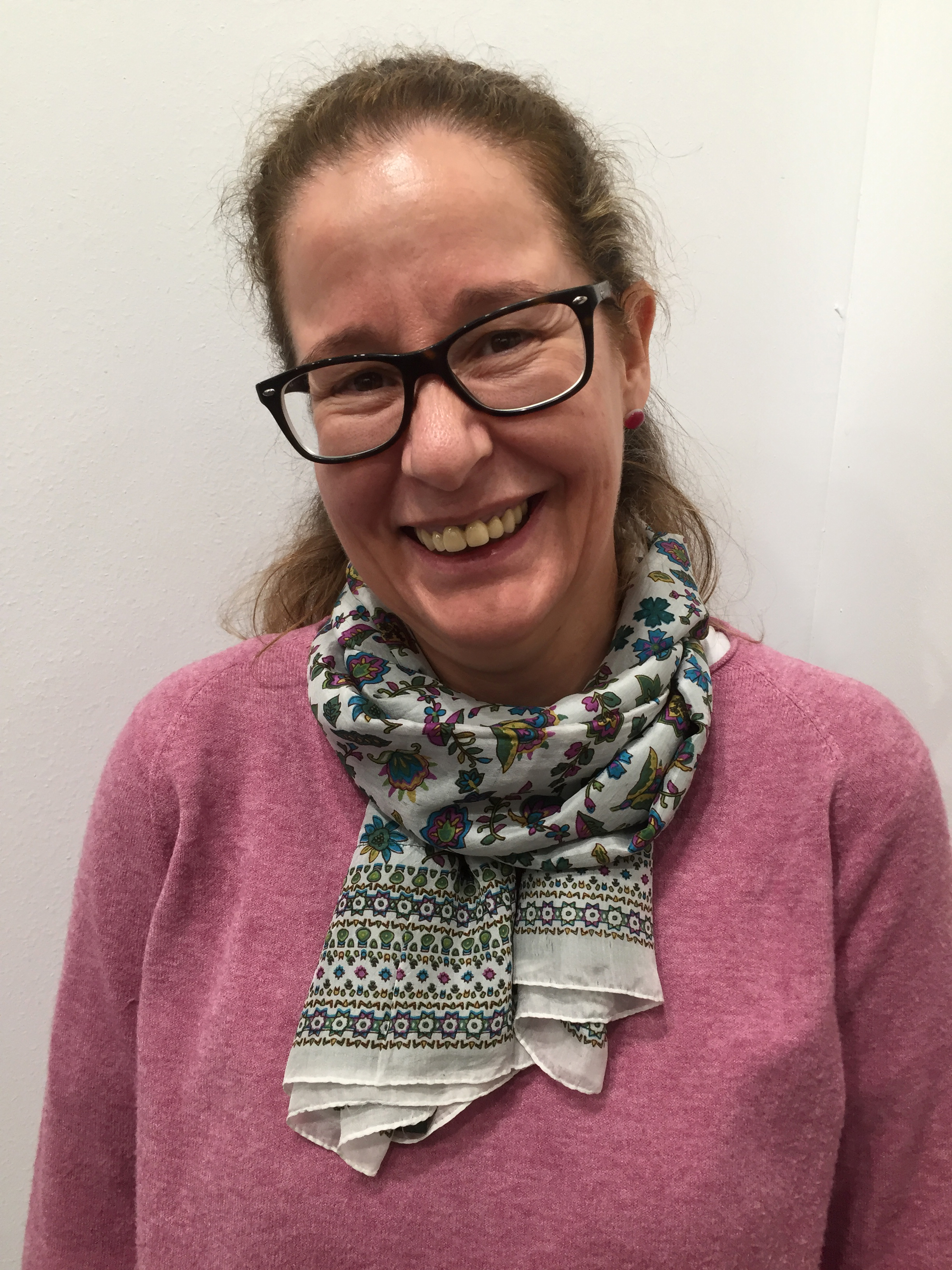 En la inauguración de la Feria de Arte Contemporáneo de Madrid ARCO 2019